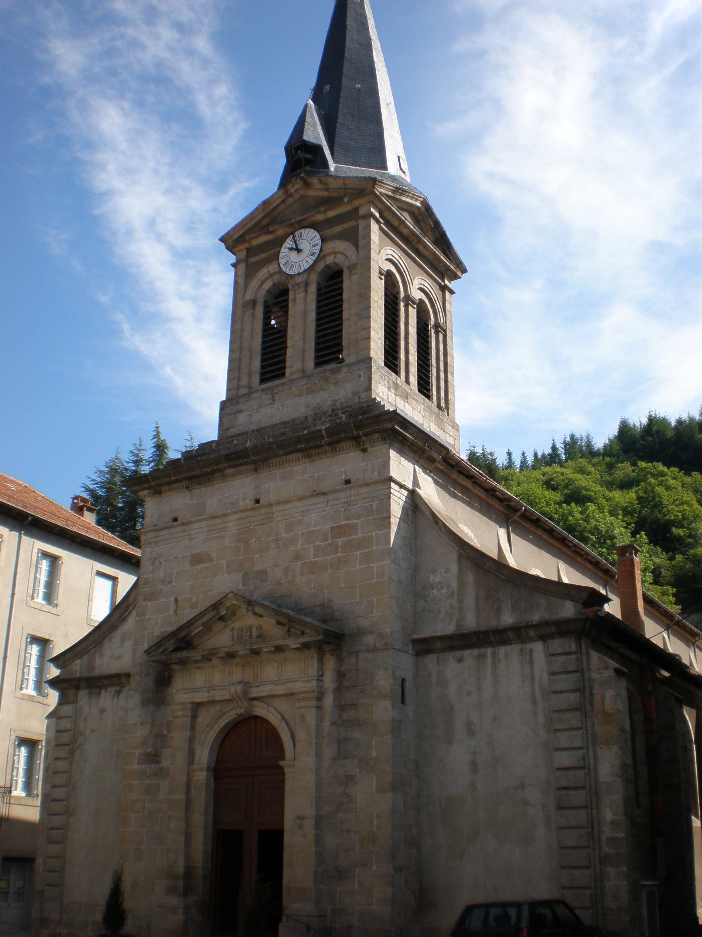 Église paroissiale Saint-Victorin de Villefort (Lozère)